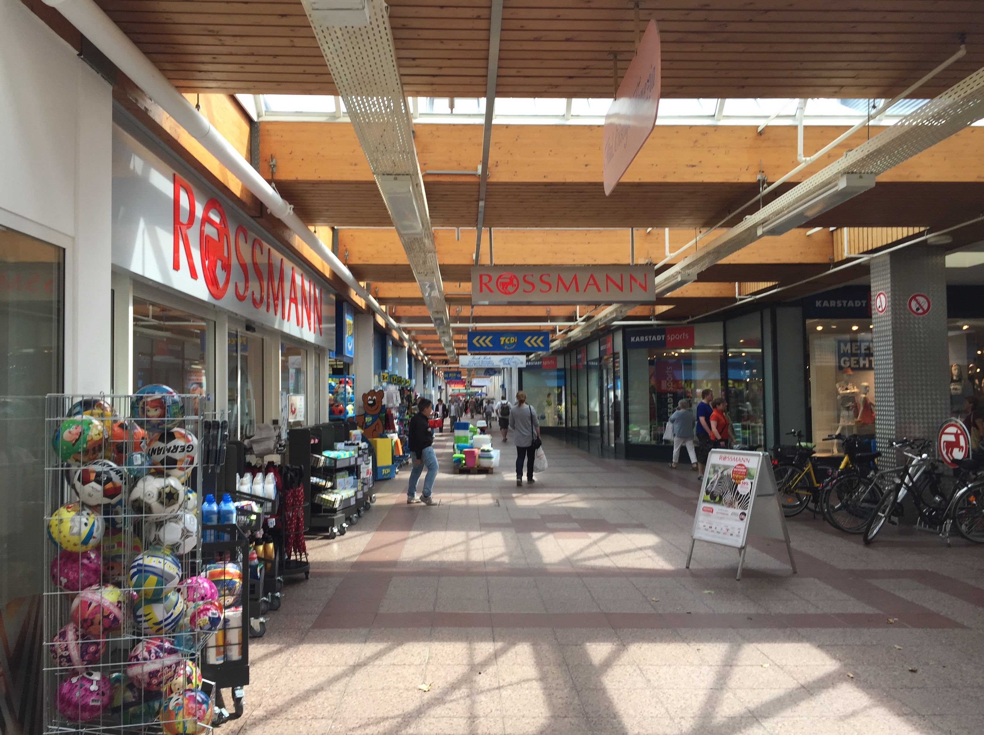 Blick in die Europa-Passage in Norderstedt